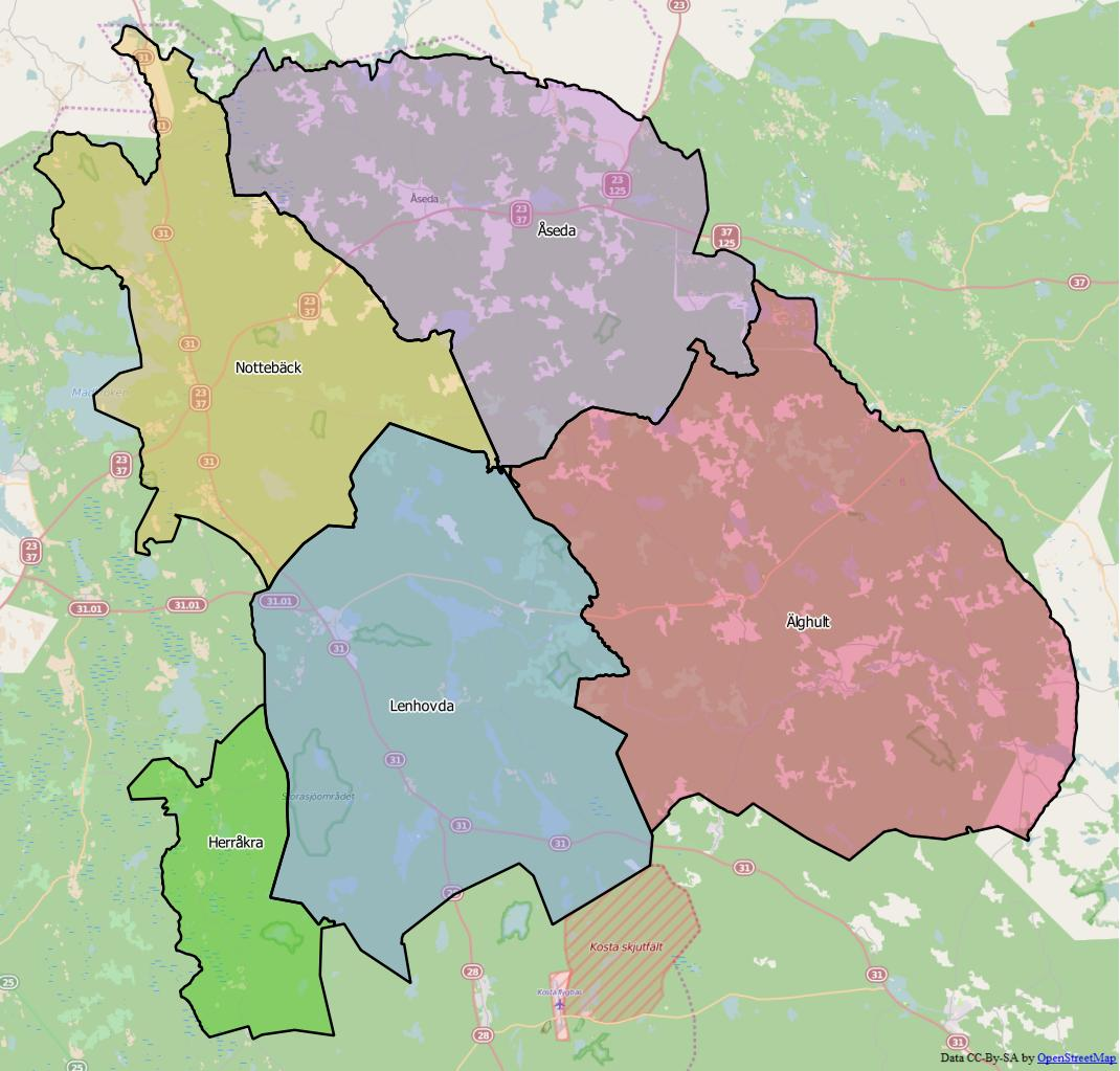 Distriktsindelningen i Uppvidinge kommun World file: 86.25009573850405786 0 0 -86.25009573850405786 1674081.99951107520610094 7811103.59695240575820208